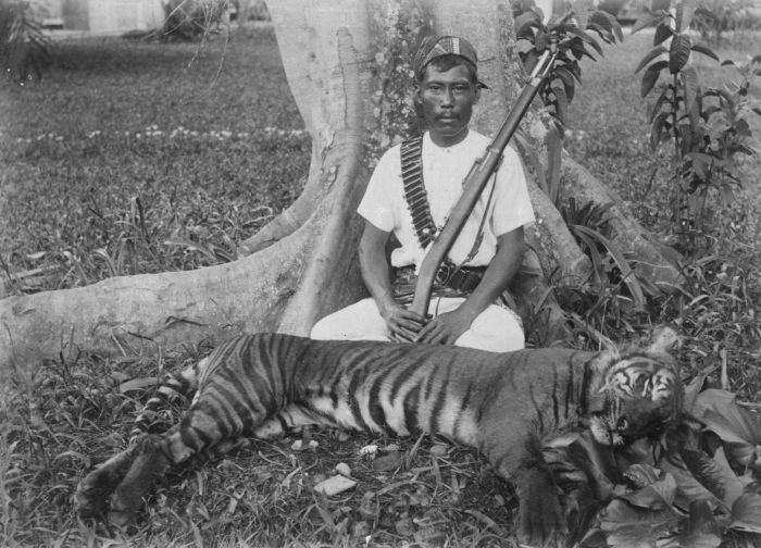 Foto. Man poseert naast een geschoten Sumatraanse tijger